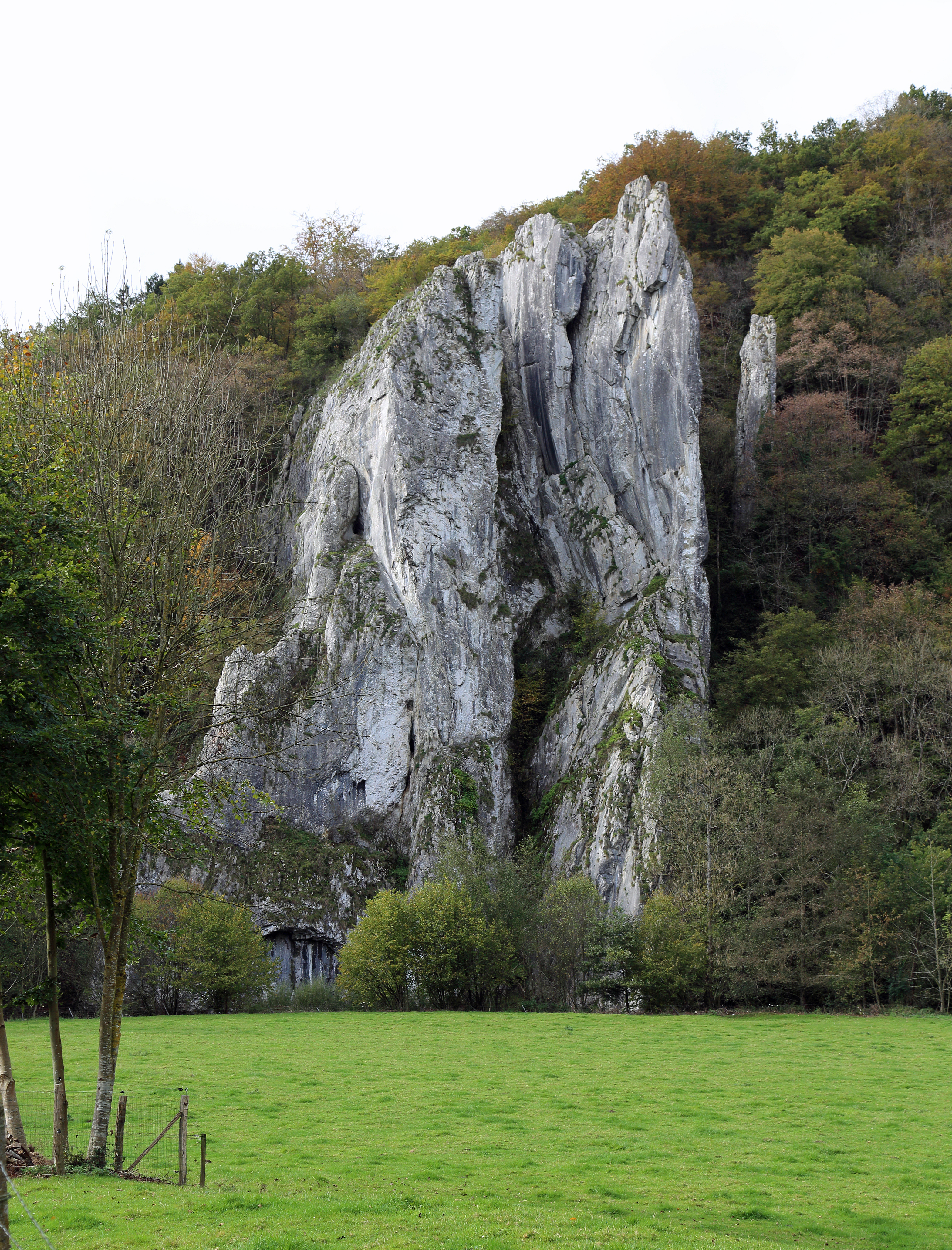 De rotsformatie Aiguilles de Chaleux in het gehucht Chaleux bij Hulsonniaux (gem. Houyet, provincie Namen, België)